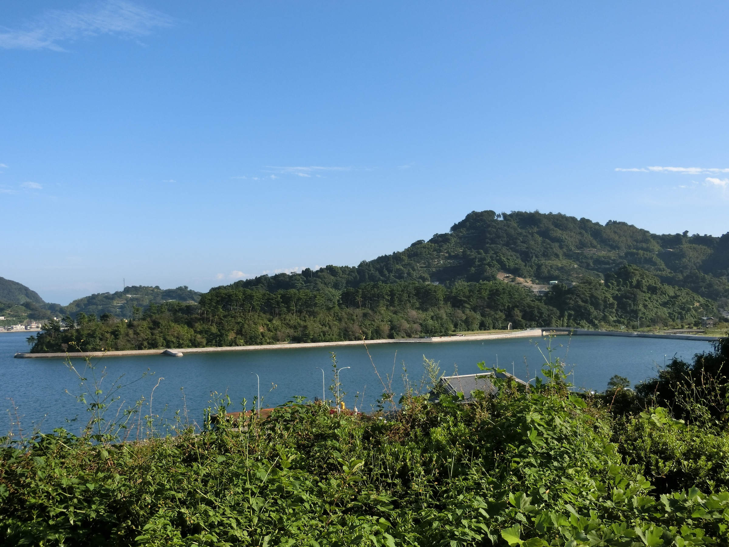 丸屋城跡の遠景（呉市下蒲刈島）